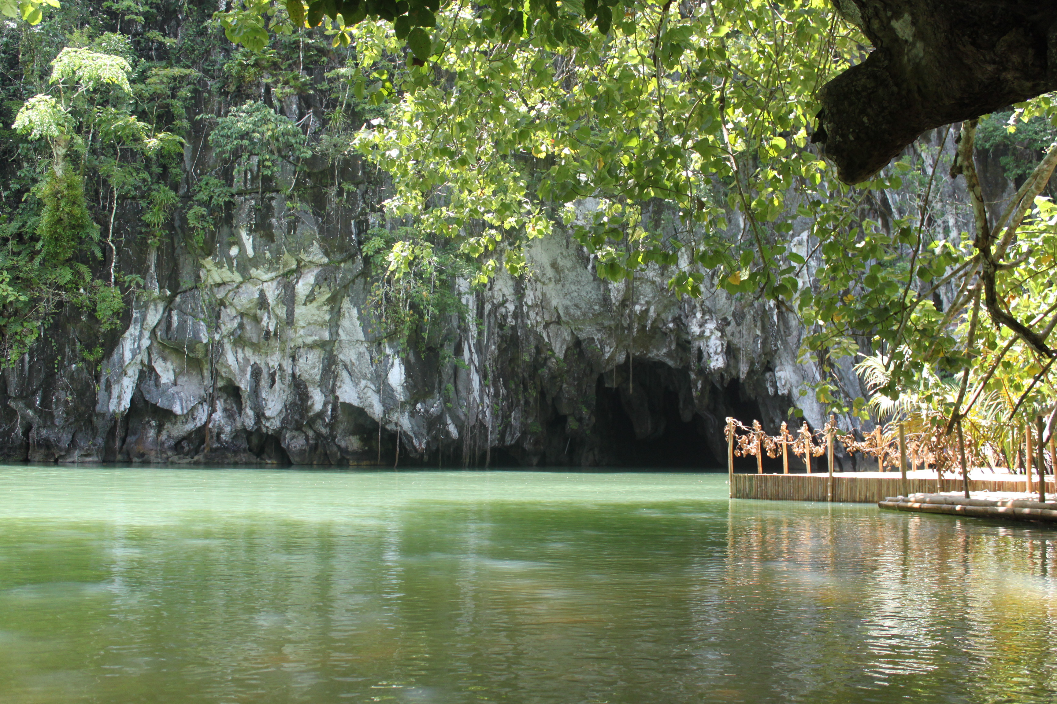 Palawan Underground